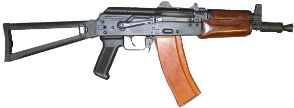 Subfusil AK-74U